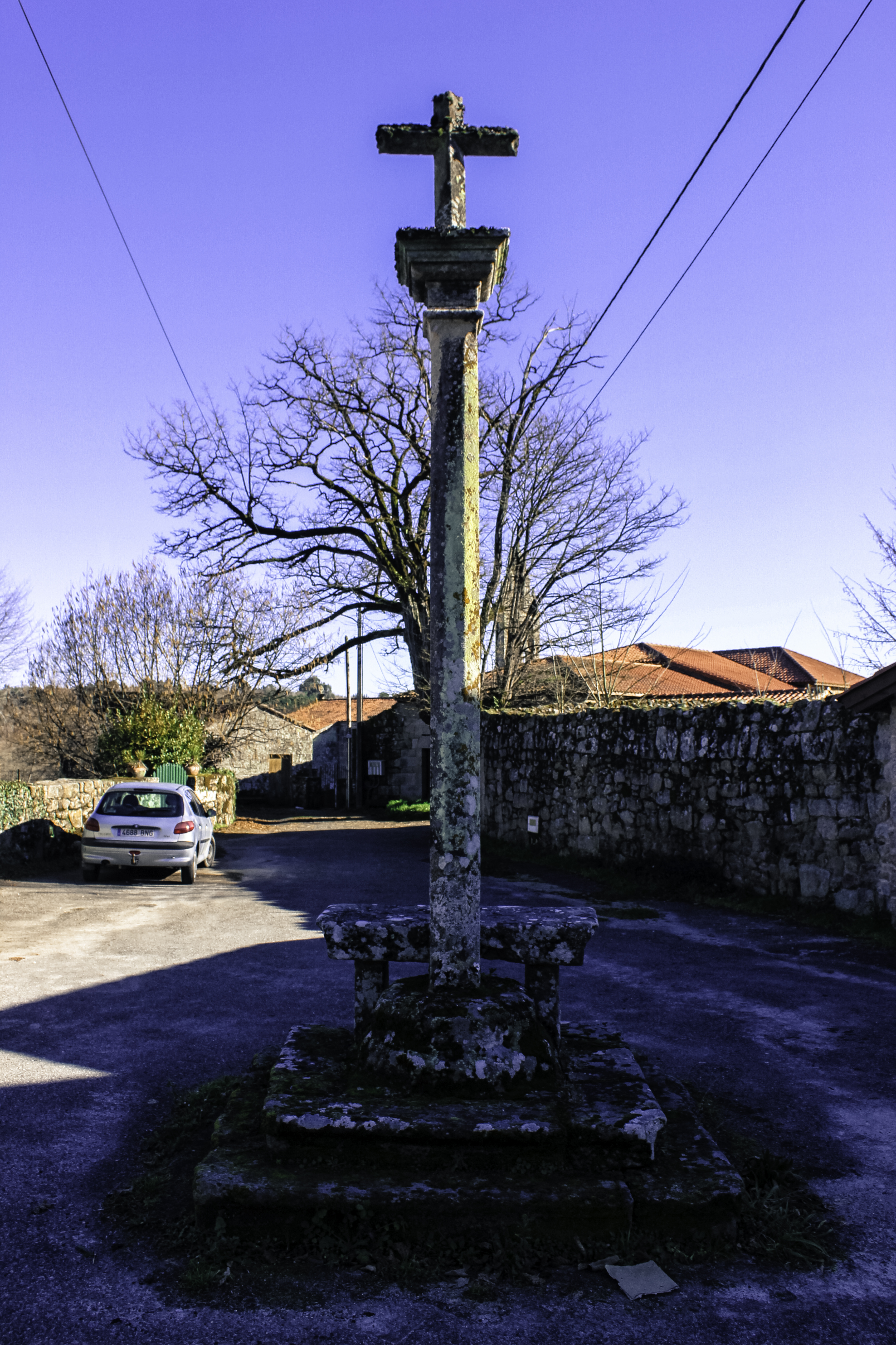 Cruceiro da Eirexa en Tamallancos, Vilamarín.